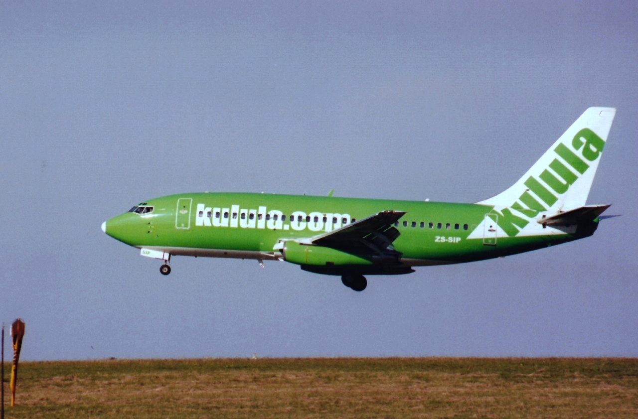 Kulula B737-230 ZS-SIP